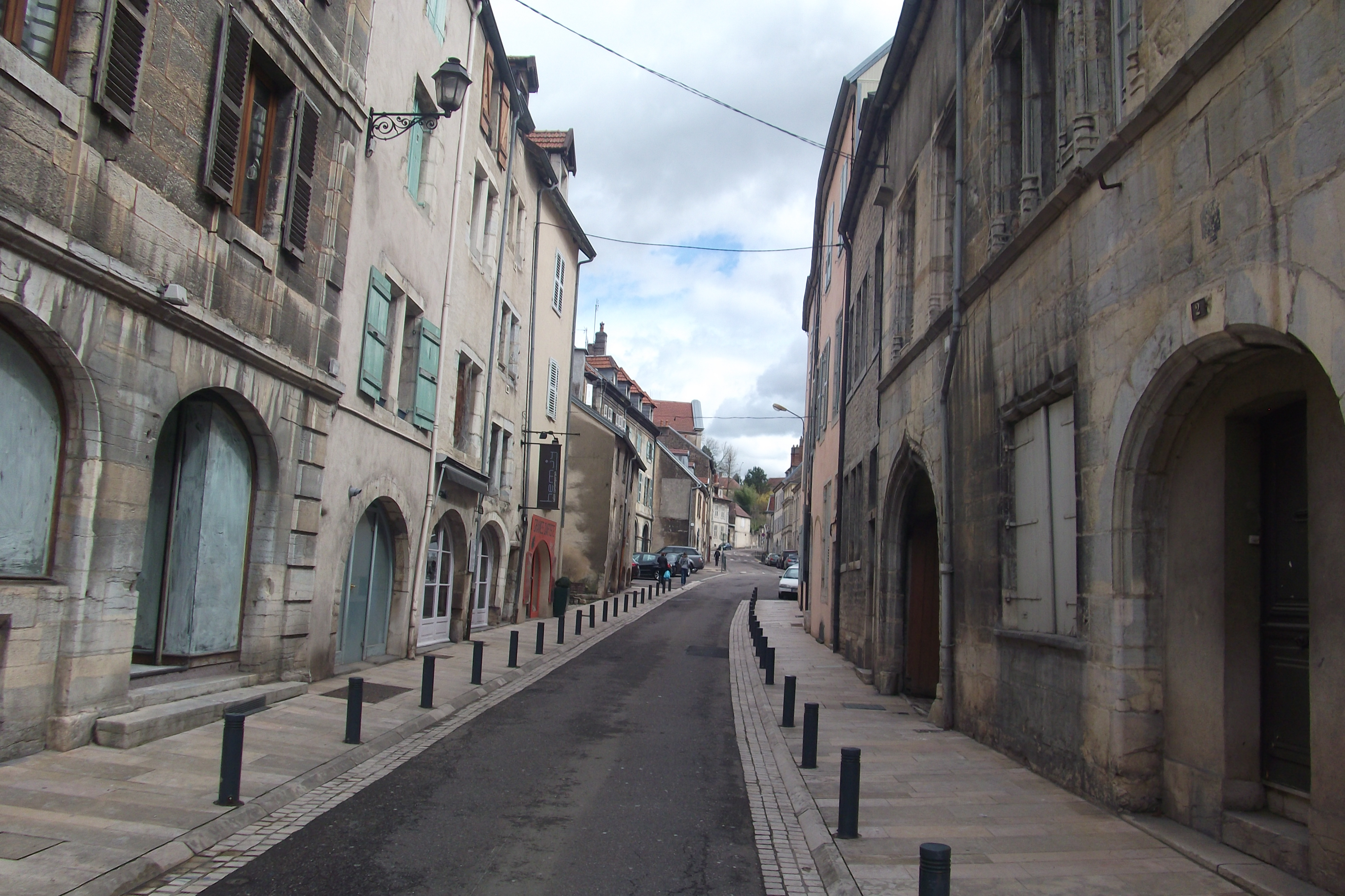 La rue Baron Bouvier dans le centre-ville de Vesoul (Haute-Saône, Franche-Comté)